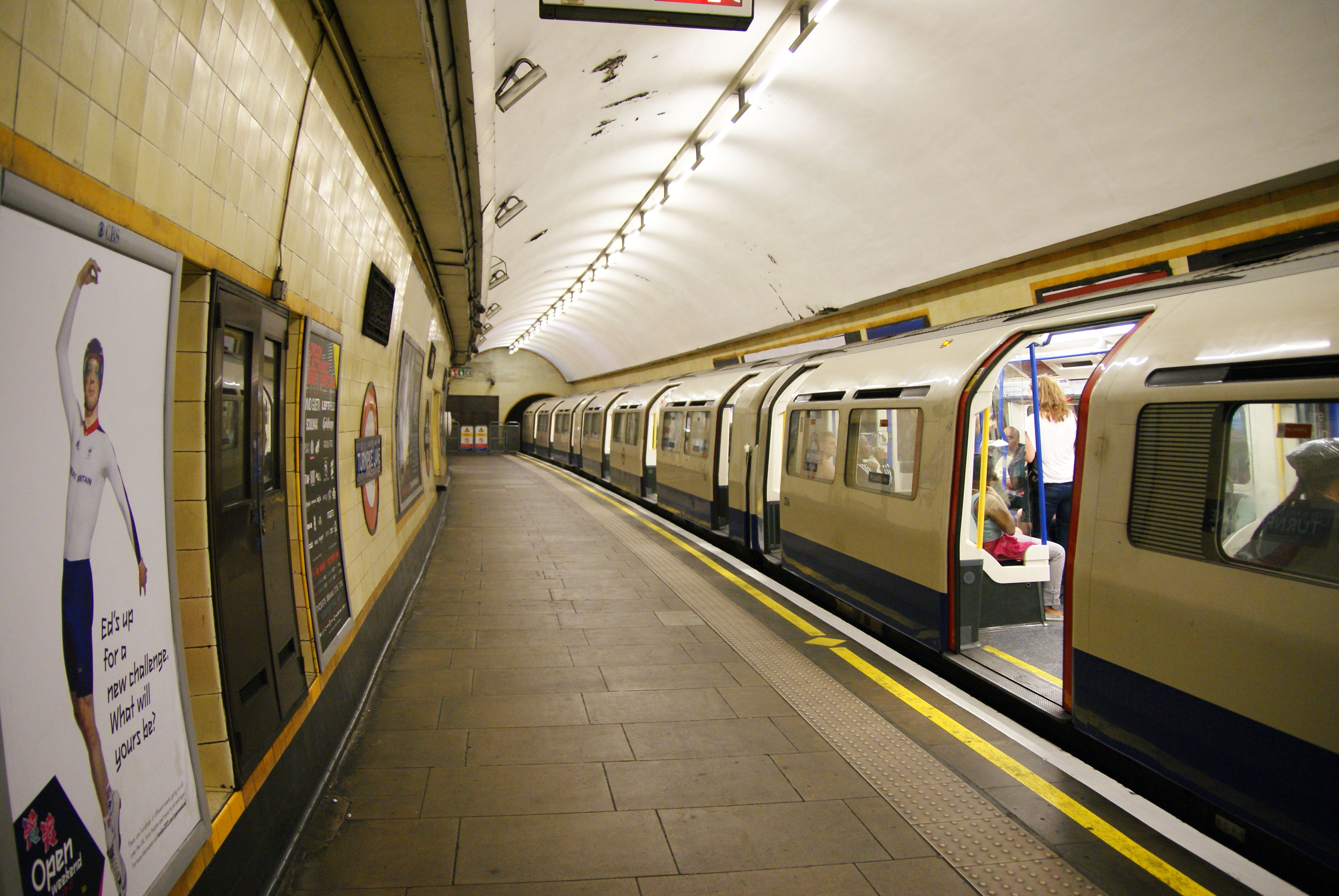 TURNPIKE LANE-01 240710 CPS